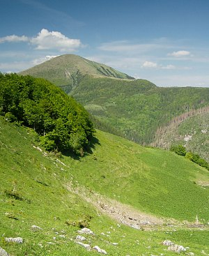 Autor: (c) 2005, TibX